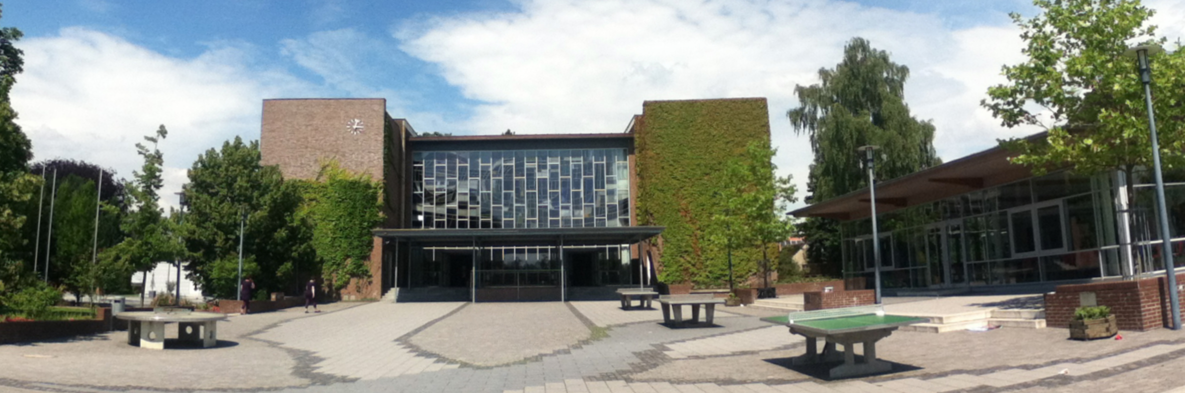 Johanneum Schulhof mit Cafeteria und zentralem Neubau Panorama